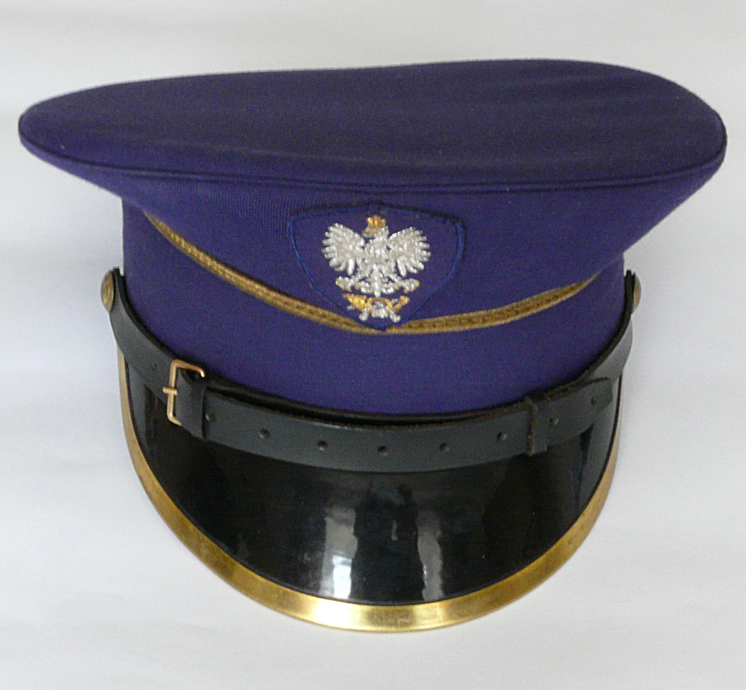 Czapka, element umundurowania pocztowca Poczty Polskiej, 1999 rok produkcji.